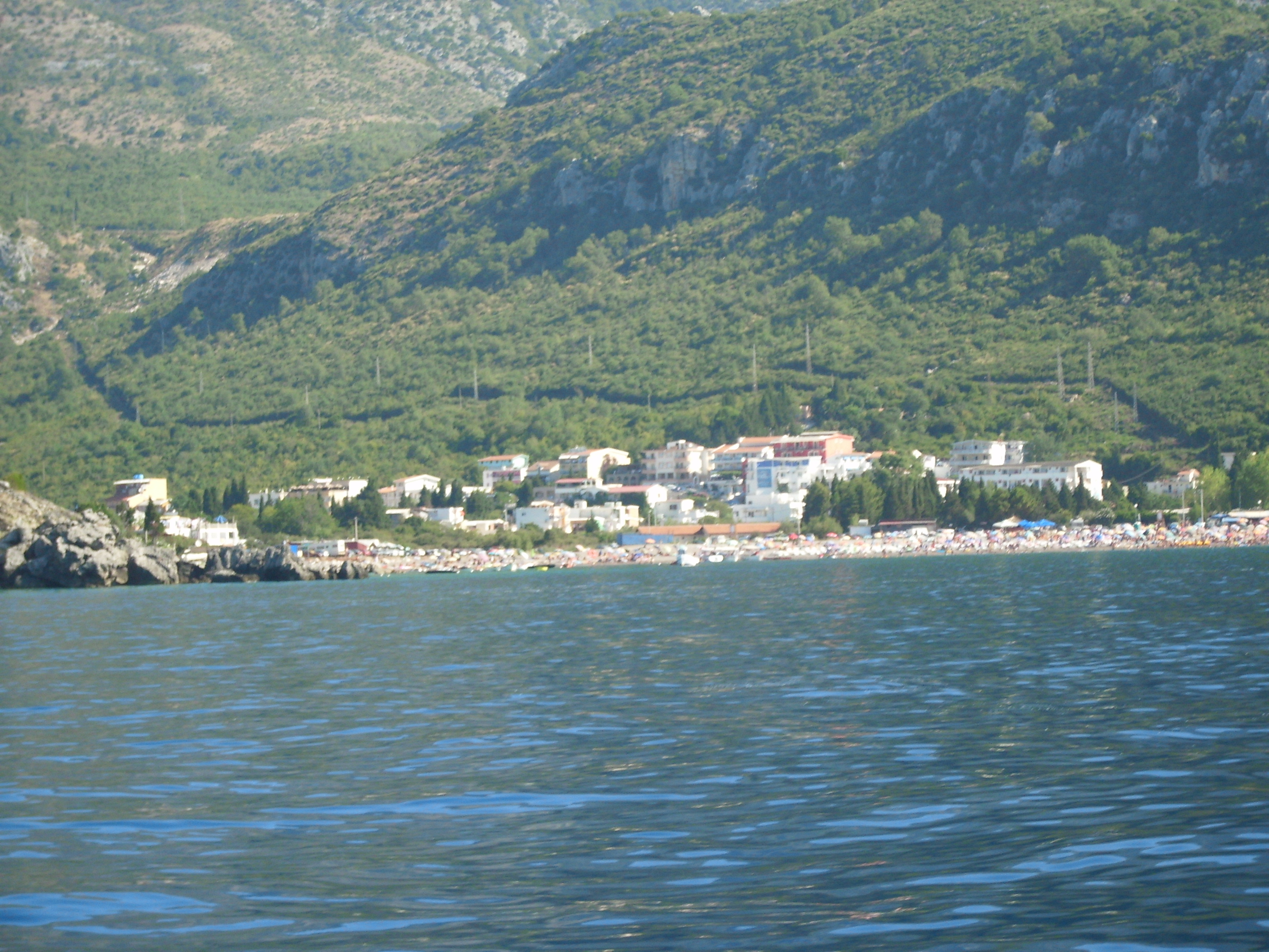 Čanj